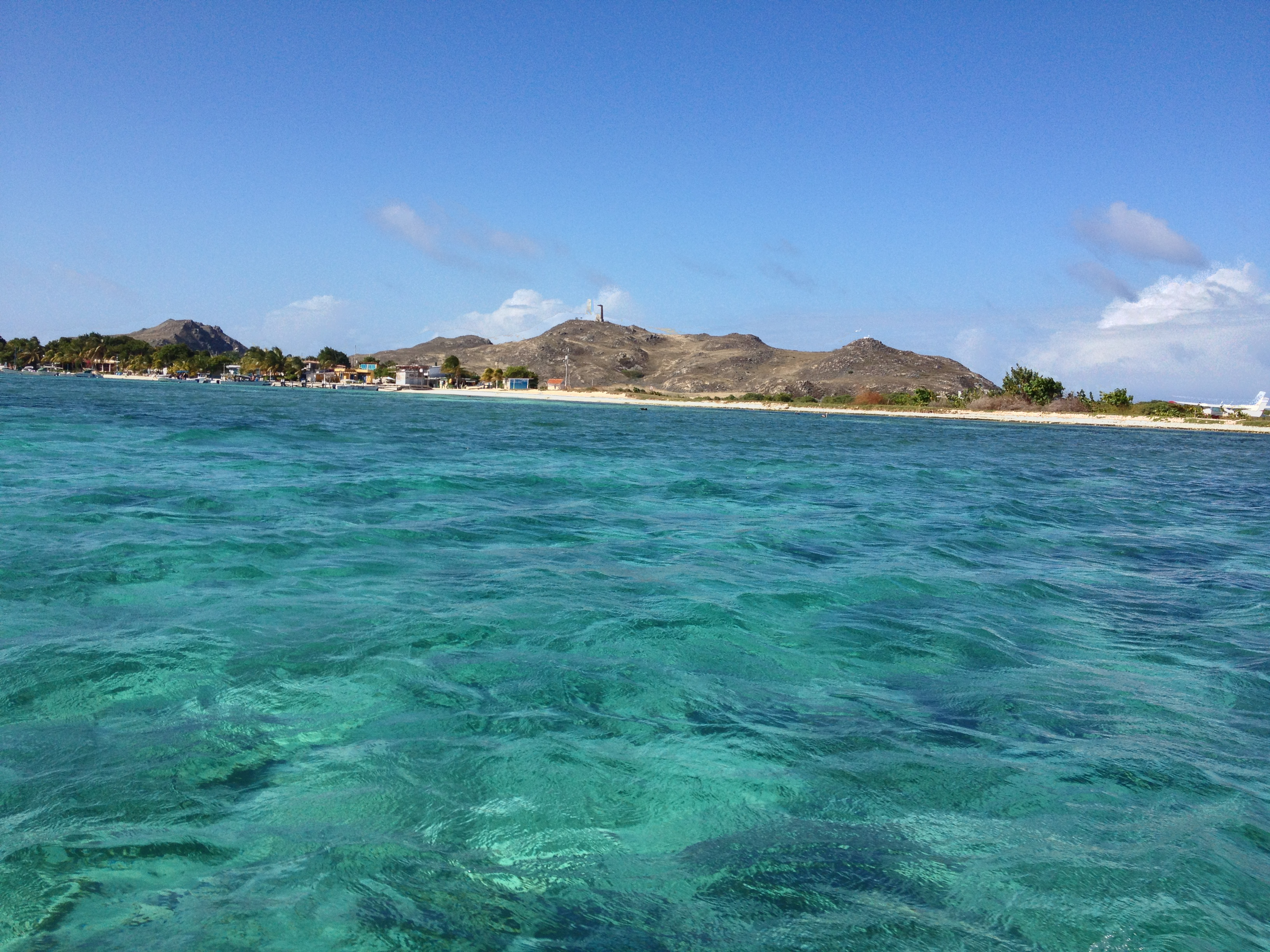 Los Roques